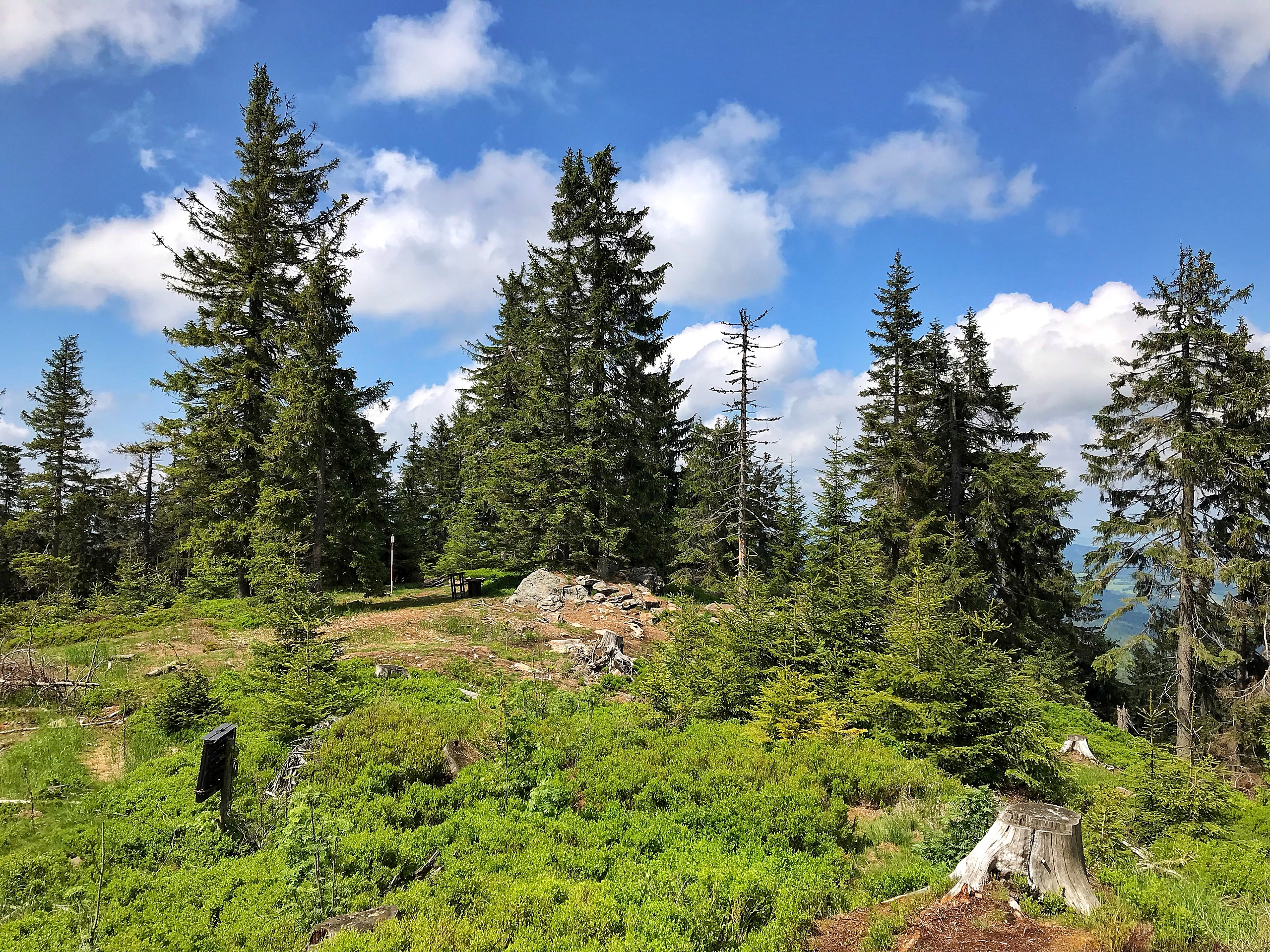 Vrchol šumavské hory Bobík (1264 m)